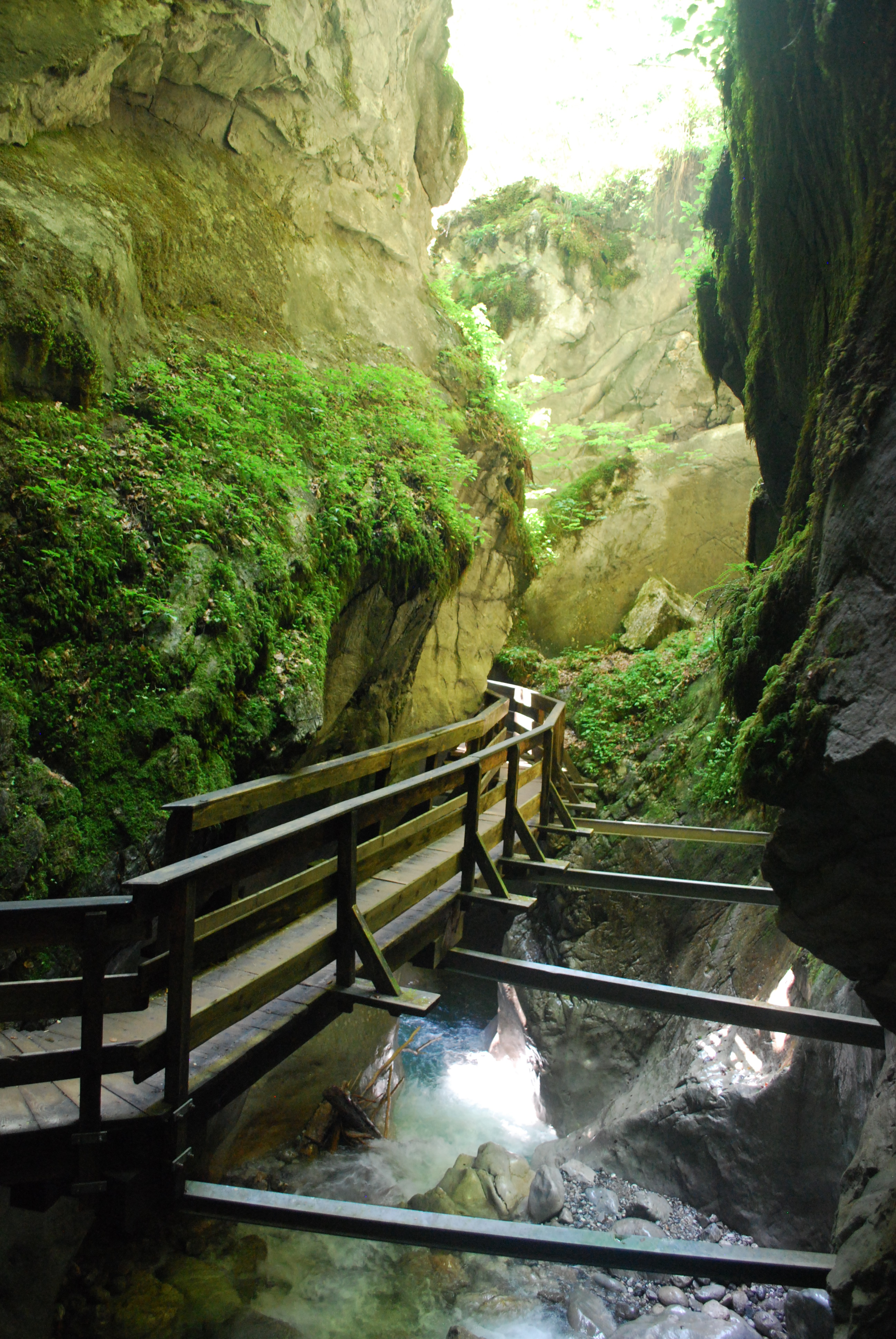 Pad Seisenbergklamm